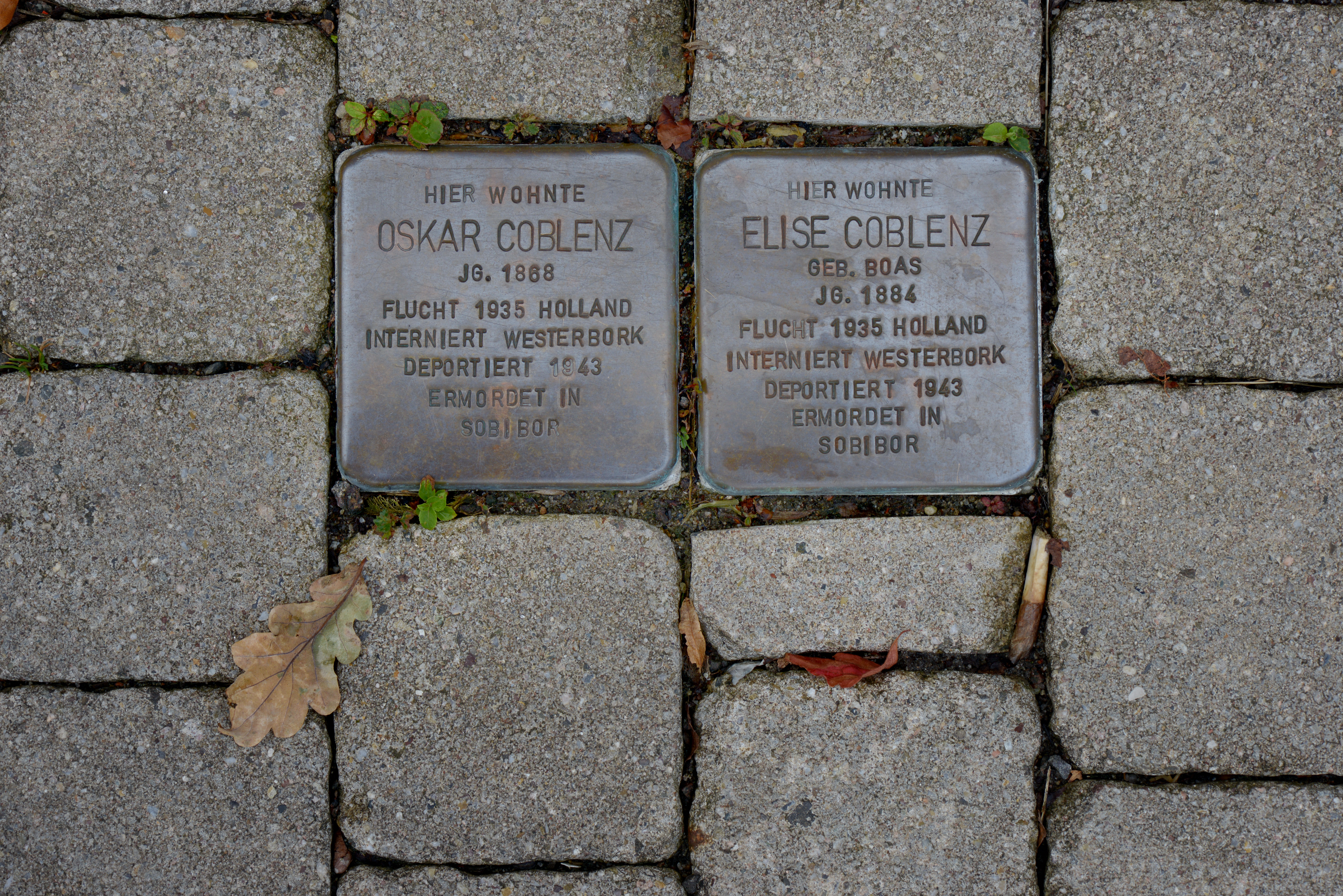 Die Stolpersteine von Elise & Oskar Coblenz befinden sich vor dem Anwesen Wilhelm-Heinrich-Straße 36 in Ottweiler, Saarland. In diesem Gebäude ist heute das Landratsamt Neunkirchen untergebracht.